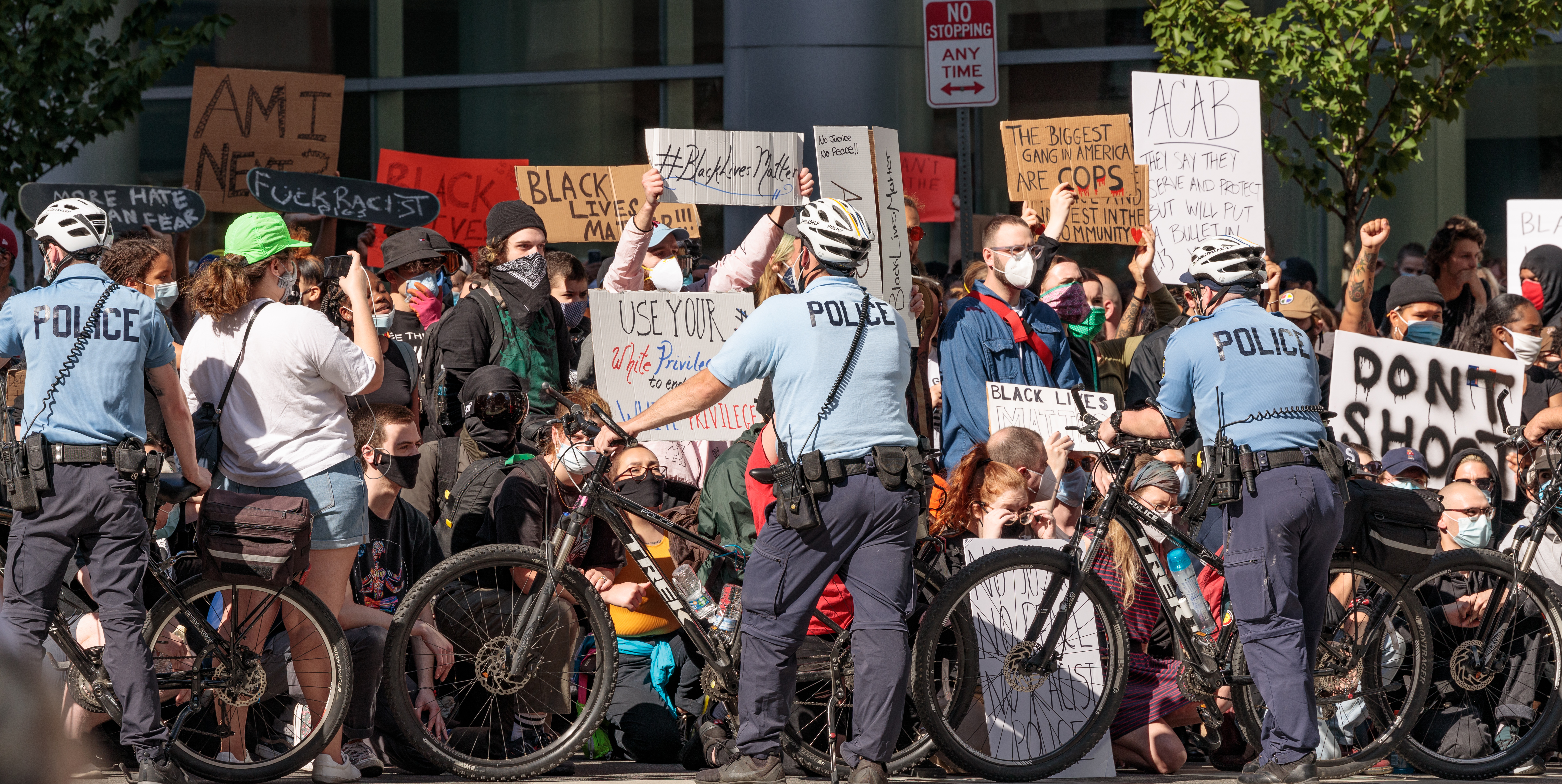 George Floyd protests in Philadelphia